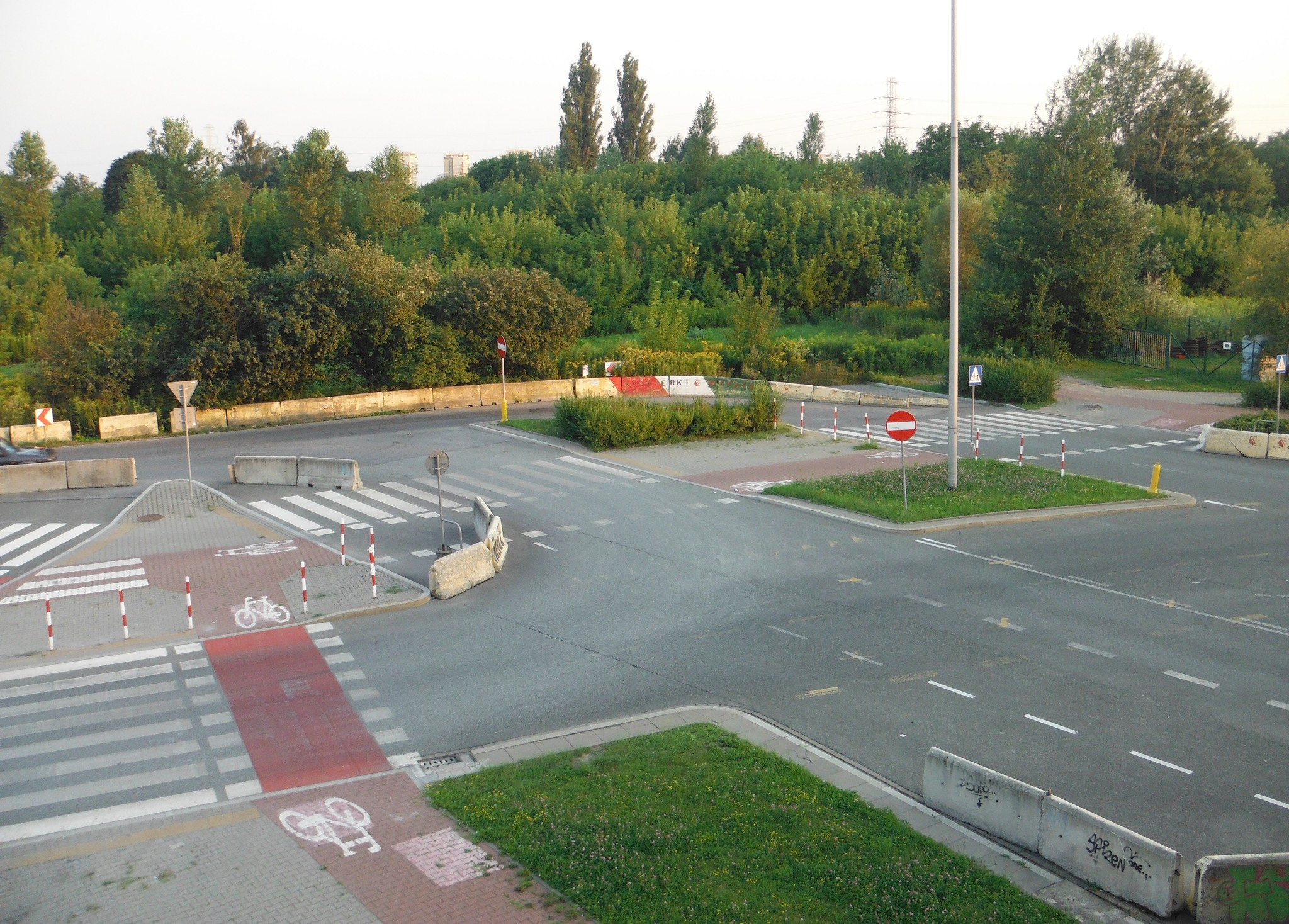 Skrzyżowanie Trasy Siekierkowskiej z projektowaną Aleją Polski Walczącej (tzw. "Czerniakowską-bis") w Warszawie.